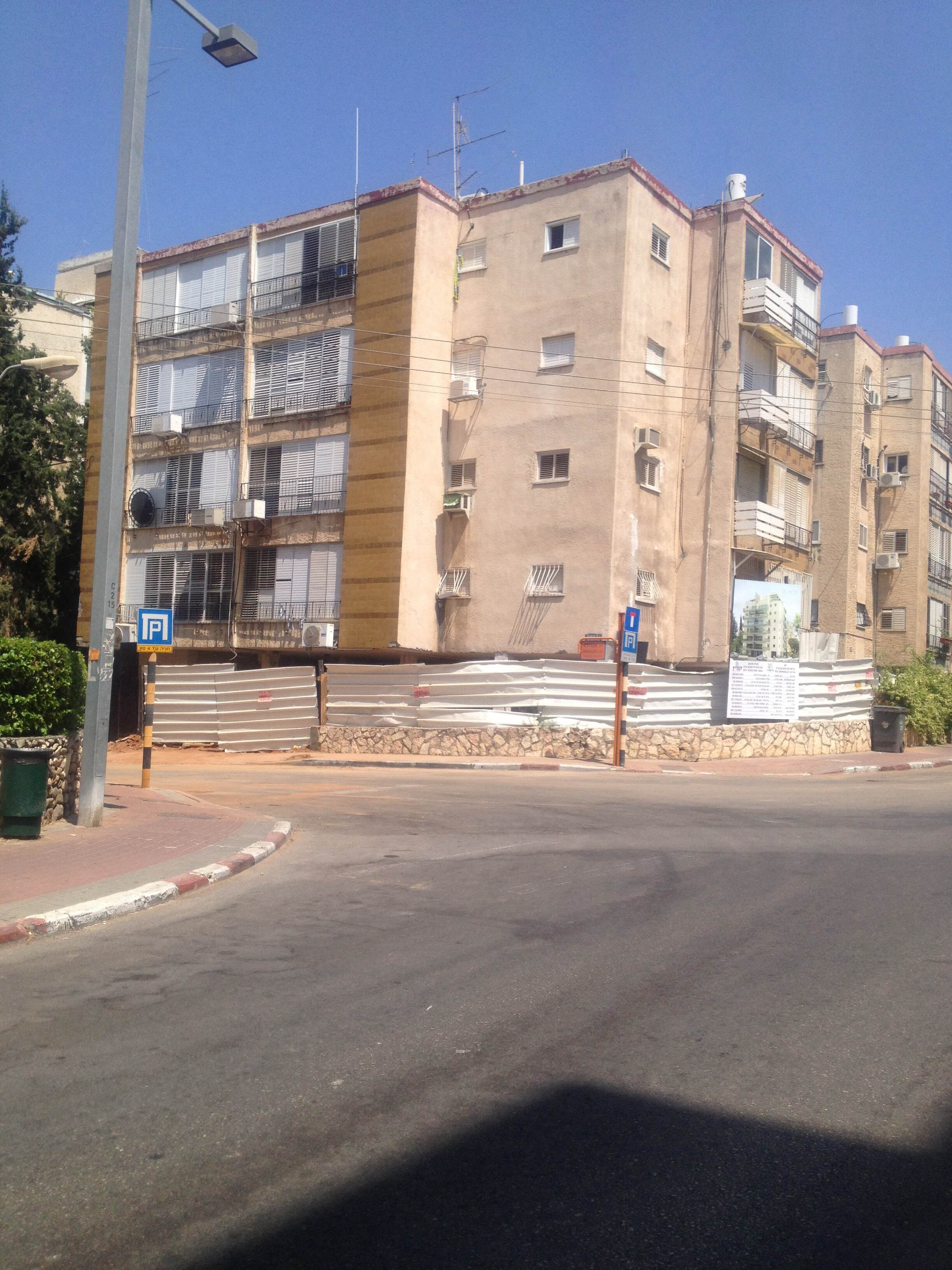 תל חי 25 ראשון לציון מצב מקורי